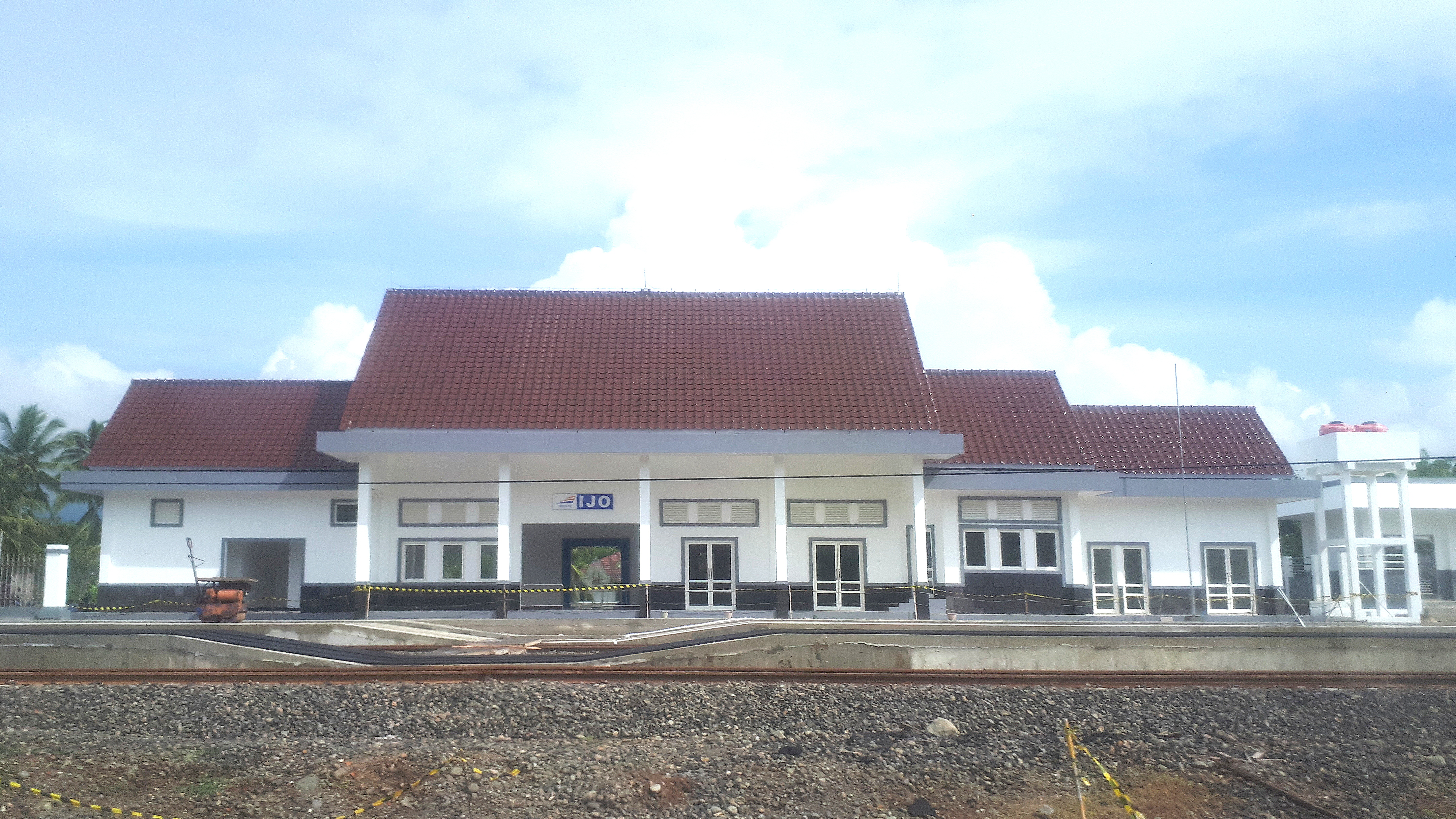 Stasiun Ijo saat dalam pembangunan. Kini ia beroperasi sejak pengoperasian Terowongan Ijo pada 21 April 2020